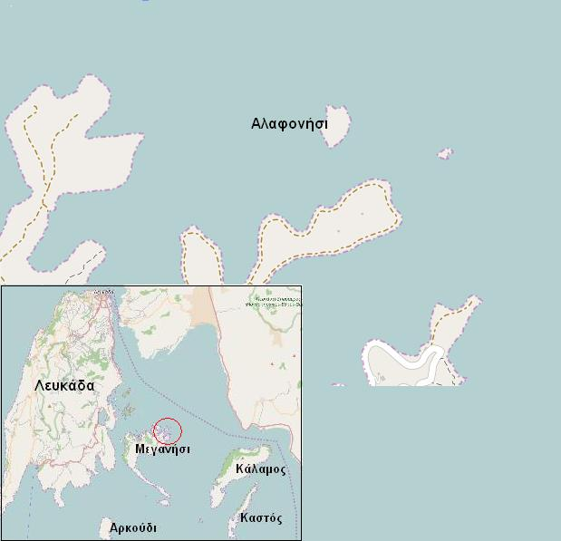 Αλαφονήσι Μεγανησίου This map may be incomplete, and may contain errors. Don't rely solely on it for navigation.